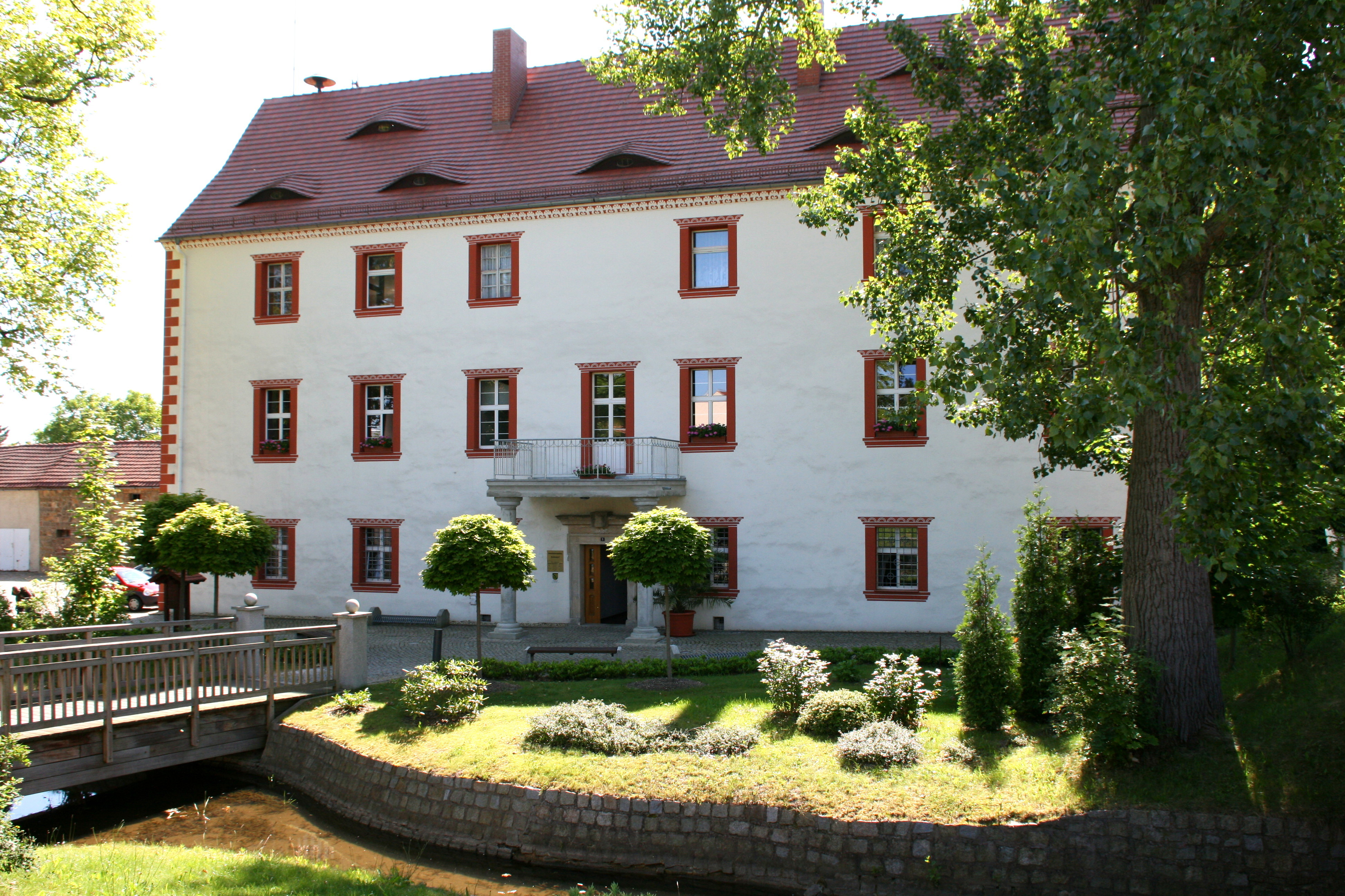 Gemeindeverwaltung Kodersdorf, Straße der Freundschaft 1 in Kodersdorf